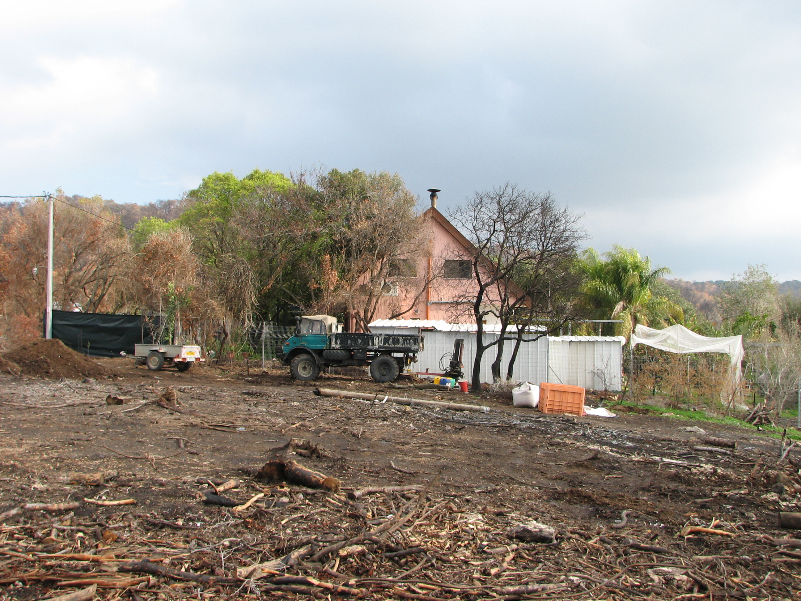 Givat Wolfson on Mount Carmel גבעת וולפסון היא קבוצת של חמישה בתים פרטיים בכרמל, בצדו המערבי של הר ערקן, בהמשך הדרך העולה מ "חניון האגם" שבנחל אורן בסמוך לכביש 721.